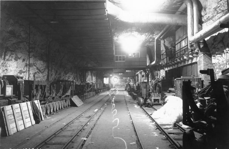 G.8501 A 211